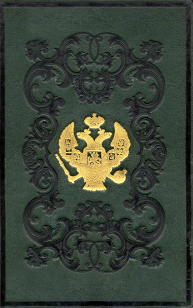 Продолжение Свода Законов Российской Империи, издания 1842 года.XII,С 1 Июля по 31 Декабря 1848 года